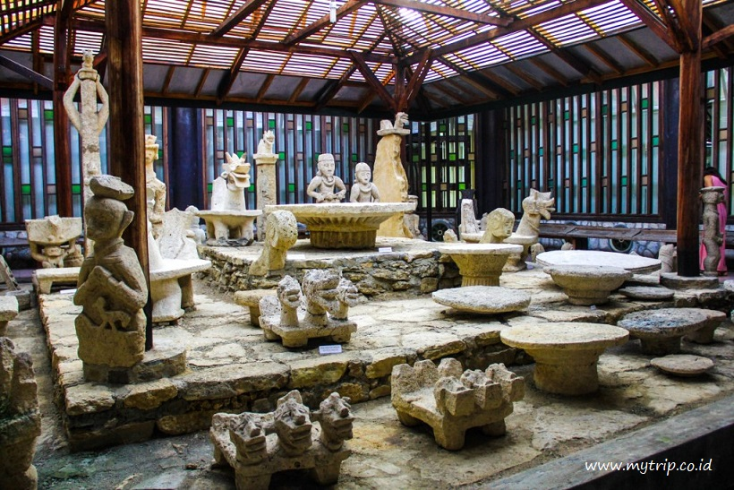 Koleksi Peninggalan Masyarakat Nias Zaman Dulu